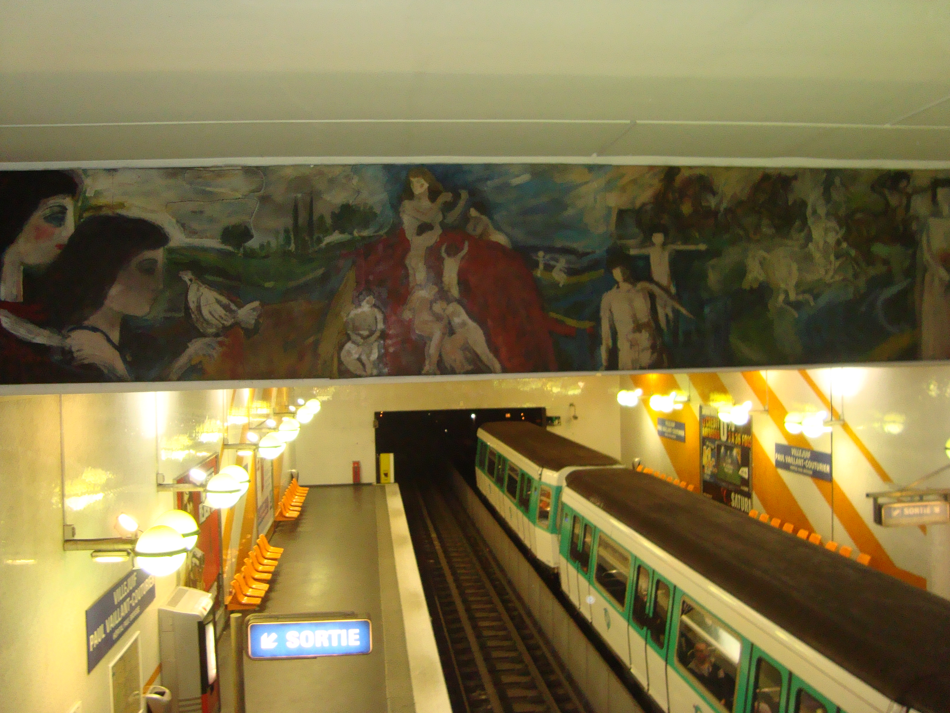 Une rame de la ligne 7 arrive à la station Villejuif - Paul Vaillant-Couturier. Vue de la mezzanine.